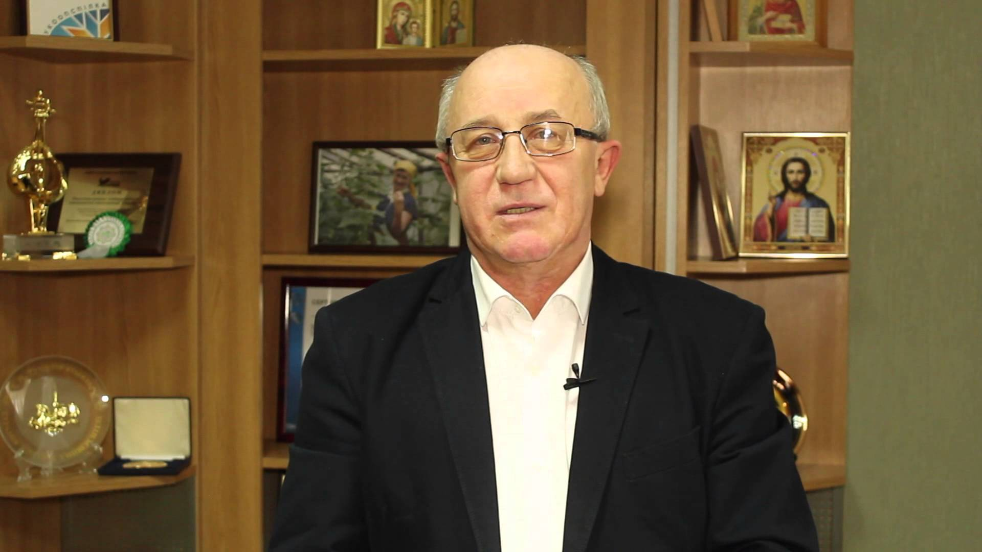 Алексей Алексеевич Нестуля